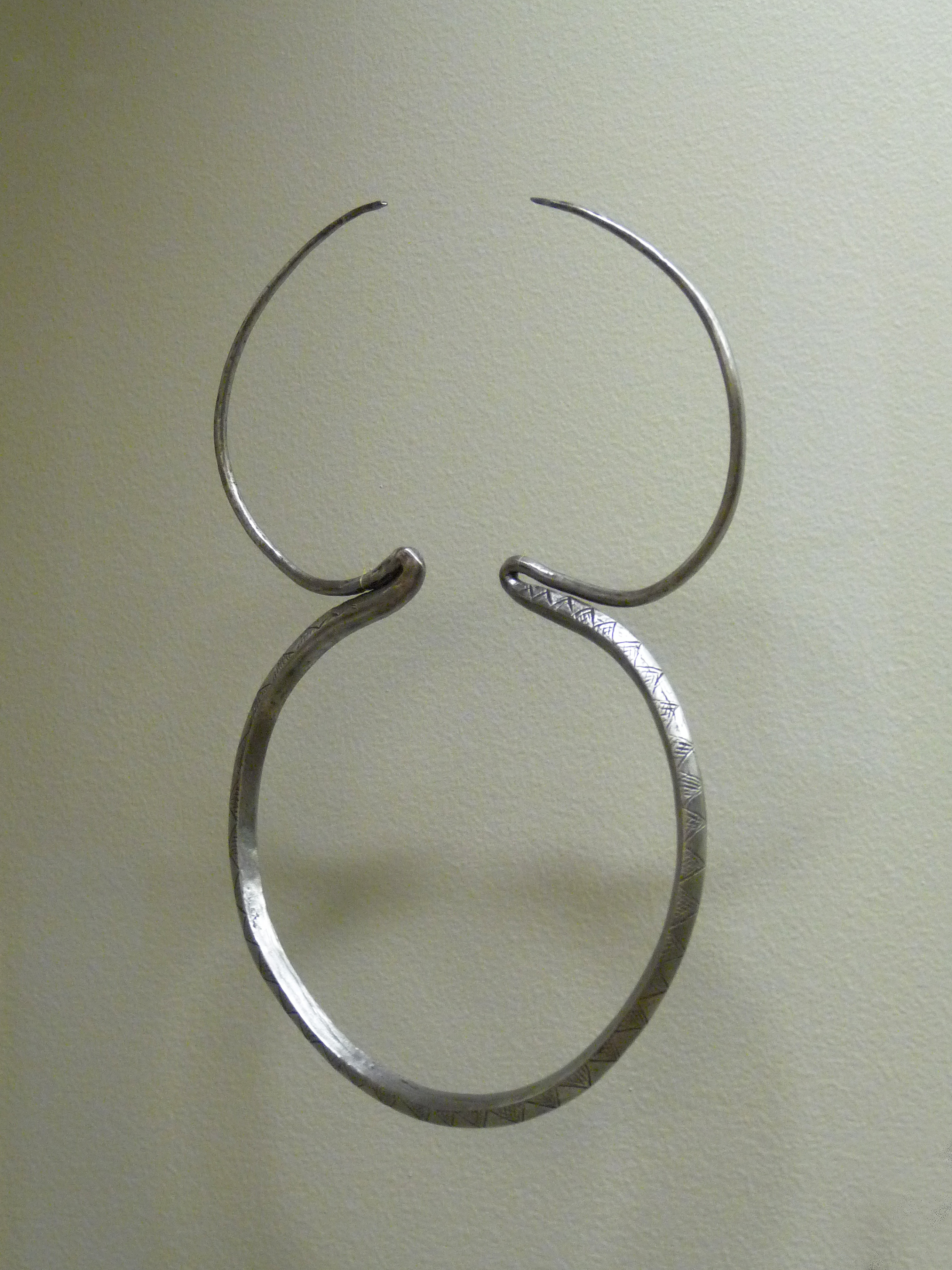 Madi (Soudan) : collier en fer forgé. Musée royal de l'Afrique centrale